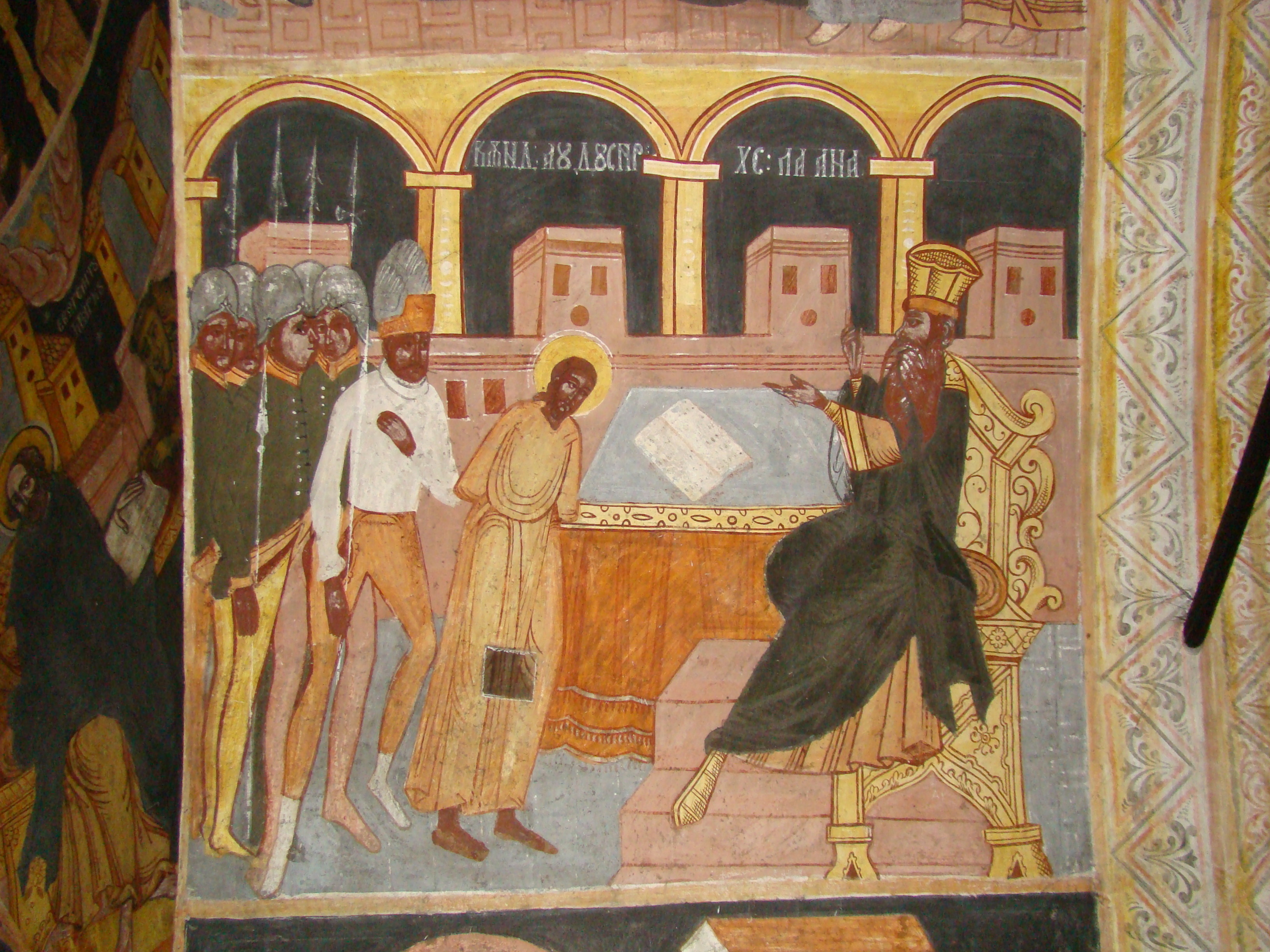 Biserica "Naşterea Domnului" , sat SĂRATA; comuna PORUMBACU DE JOS